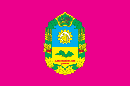 Прапор Близнюківського району